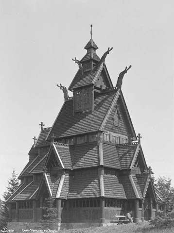 Gol stavkyrkje (Gol stave church, Norsk folkemuseum, Bygdøy, Oslo, Norway. Originally Gol, Buskerud fylke). Picture taken in the periode 1880 - 1890. Photographer: Axel Lindahl (1841-1906).